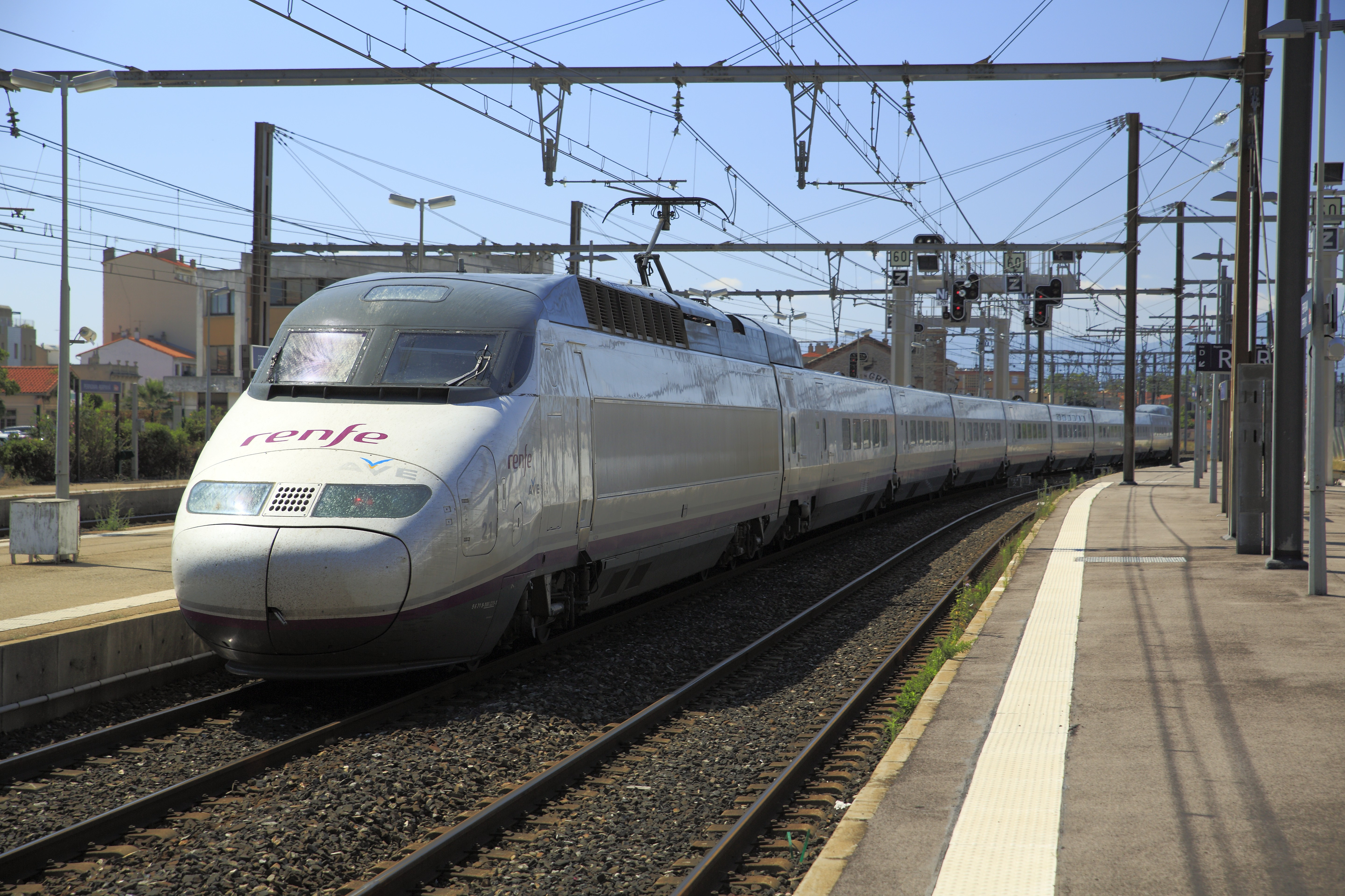 Renfe-Einheit bei der Ausfahrt nach Barcelona Sants, Nachschuss